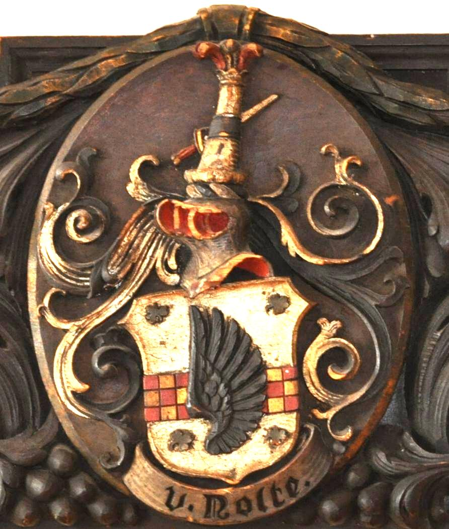 Wappen des General von Nolte